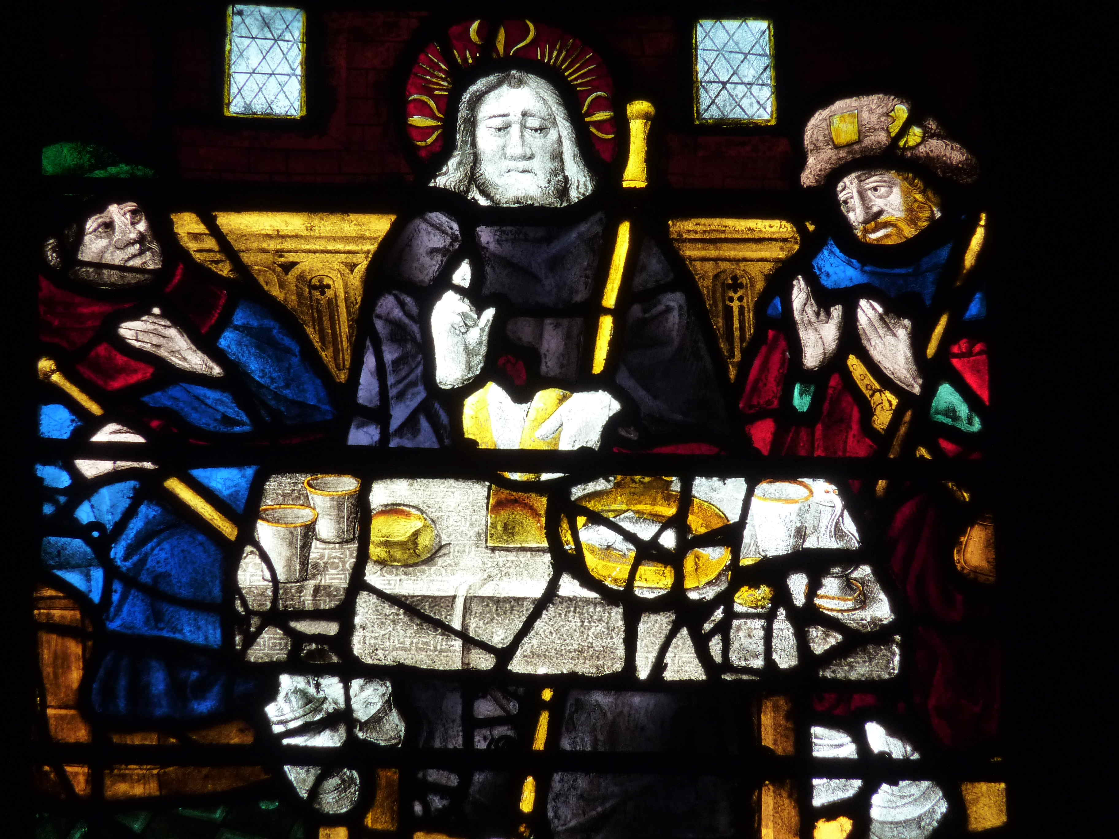 Katholische Kirche Saint-Pierre in Dreux im Département Eure-et-Loir (Centre-Val de Loire/Frankreich), Bleiglasfenster (baie 4) aus dem frühen 16. Jahrhundert im Chor; Darstellung: Tod und Auferstehung Christi, Ausschnitt: Emmausjünger